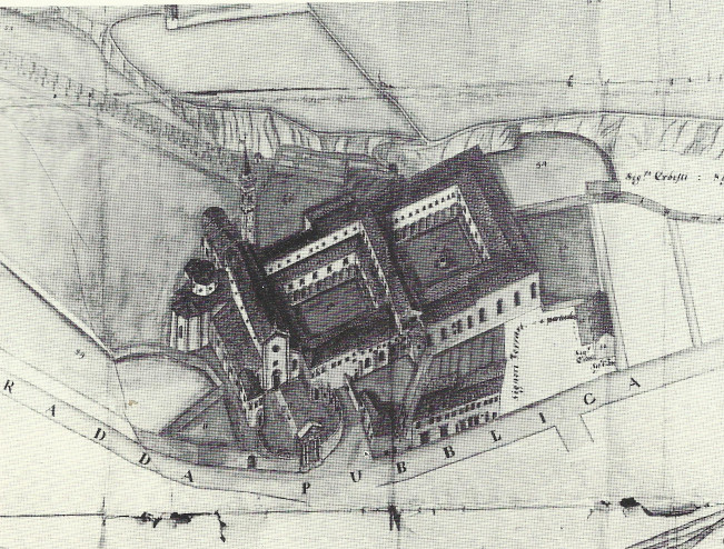 Planimetria della Chiesa dei Santi Nazaro e Celso a Verona